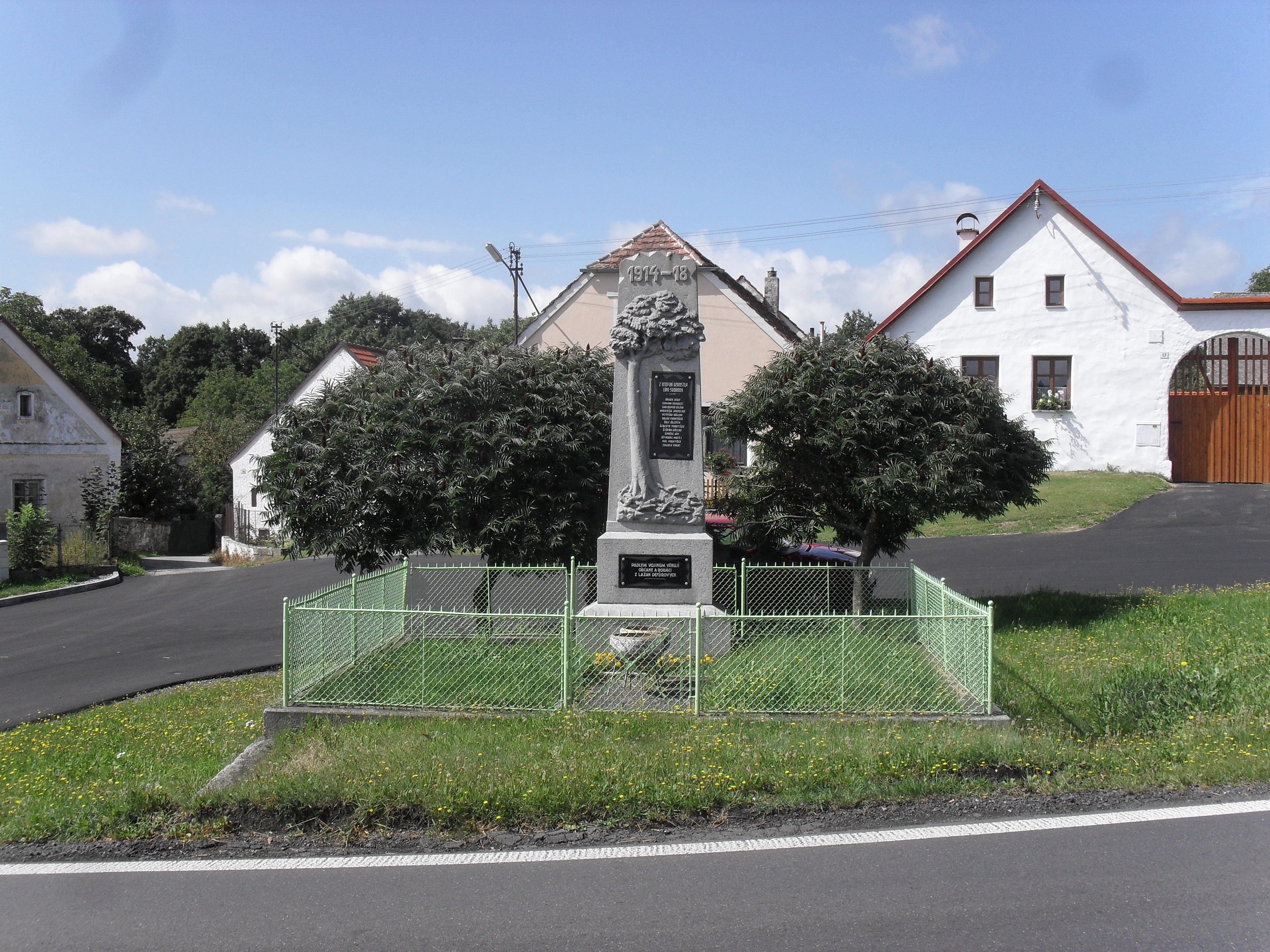 Fotografie pořízena v obci Defurovy Lažany.